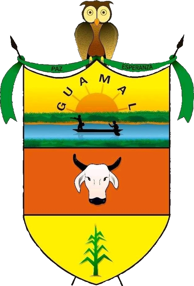 En el segundo cuartel encuentrase la representación de nuestra riqueza agropecuaria cuyo fondo es de color rojo. En el tercer cuartel de fondo amarillo encuentrase allí una planta que representa la productividad. EL Escudo de la municipalidad es de característica ojival invertido y de aspectos contra palado, por dos lanzas, herramientas de manutención de nuestros aborígenes.